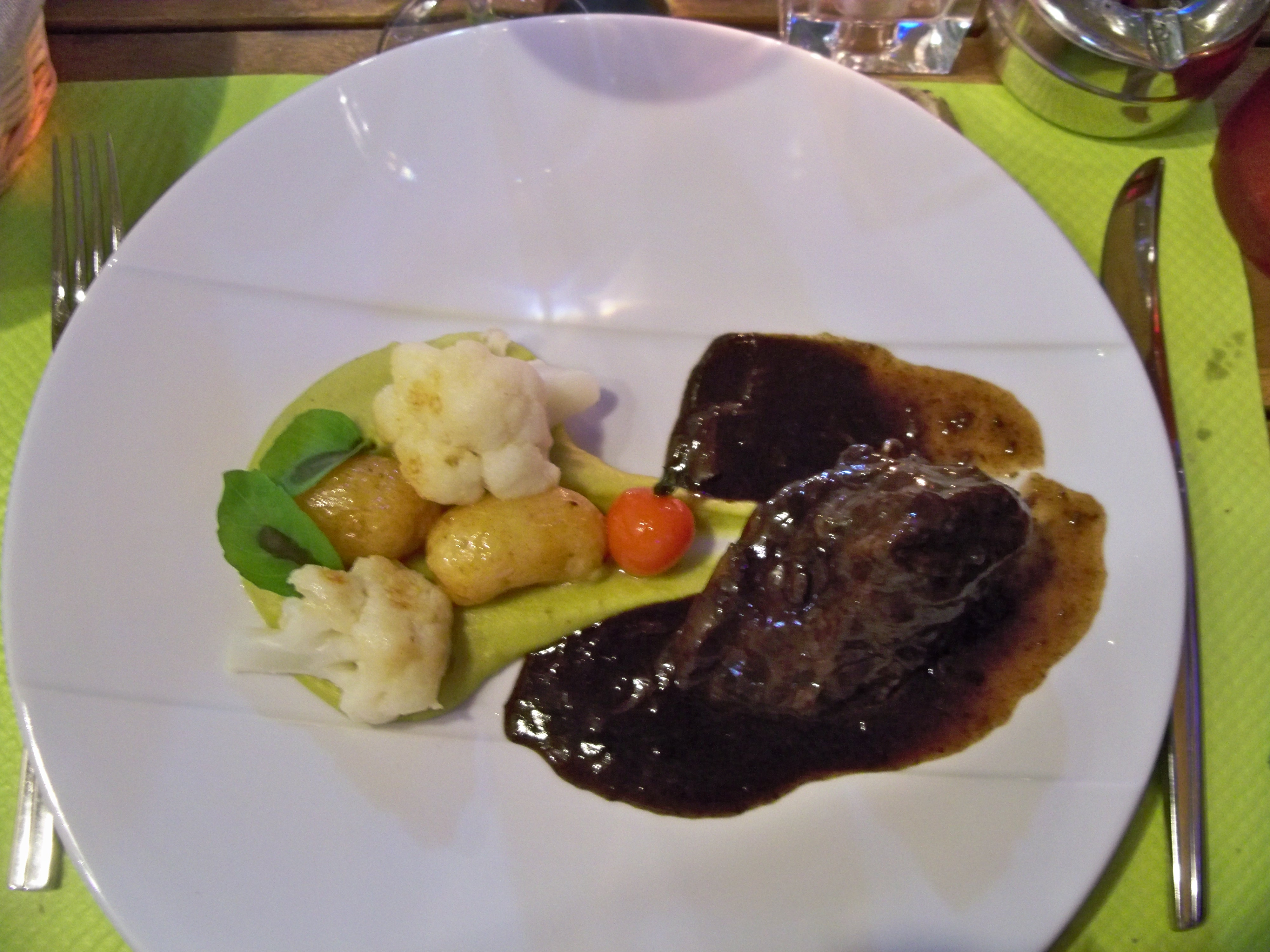 Joue de boeuf façon daube comtadine